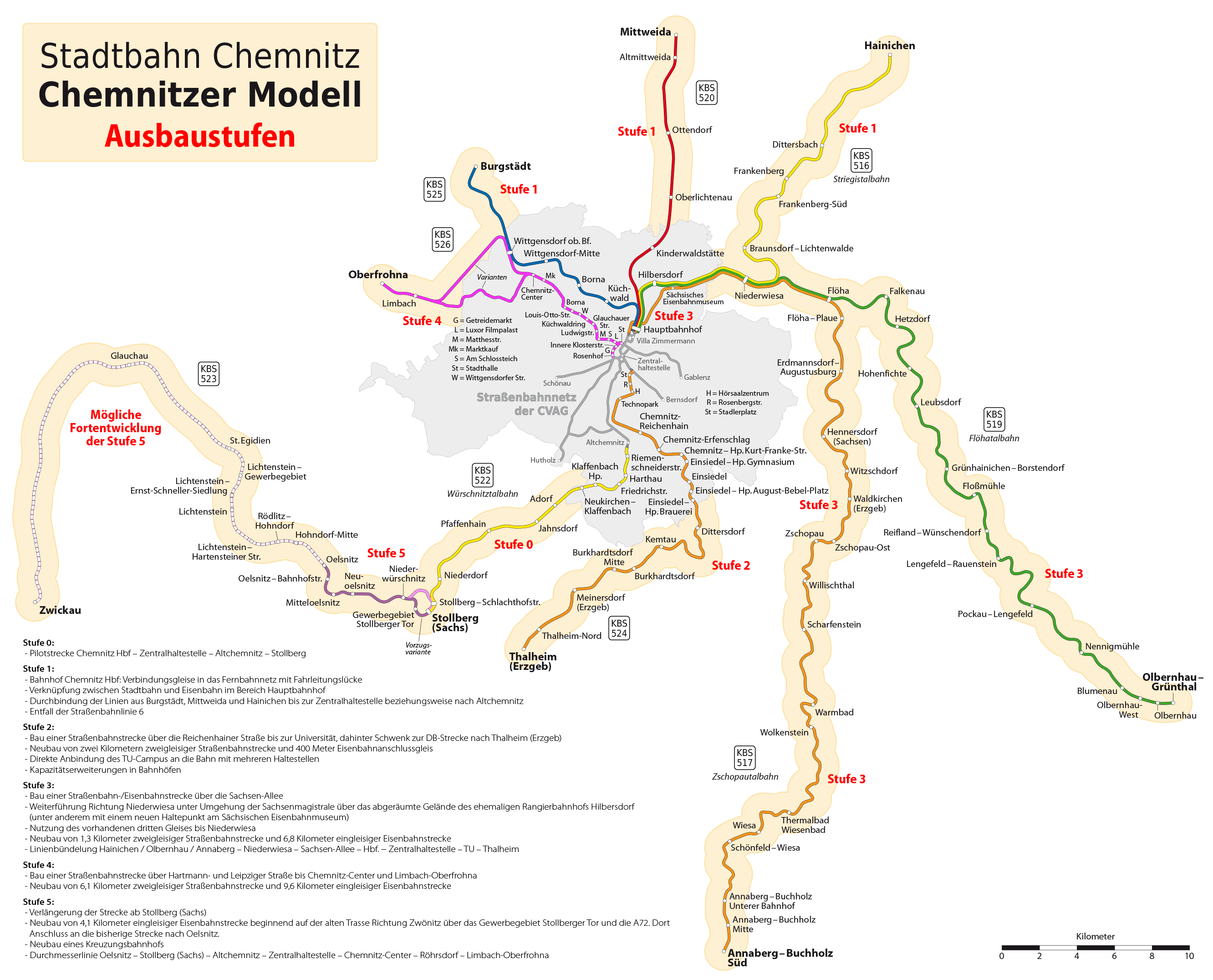 Karte: Ausbauvarianten der Stadtbahn Chemnitz gemäß dem Chemnitzer Modell